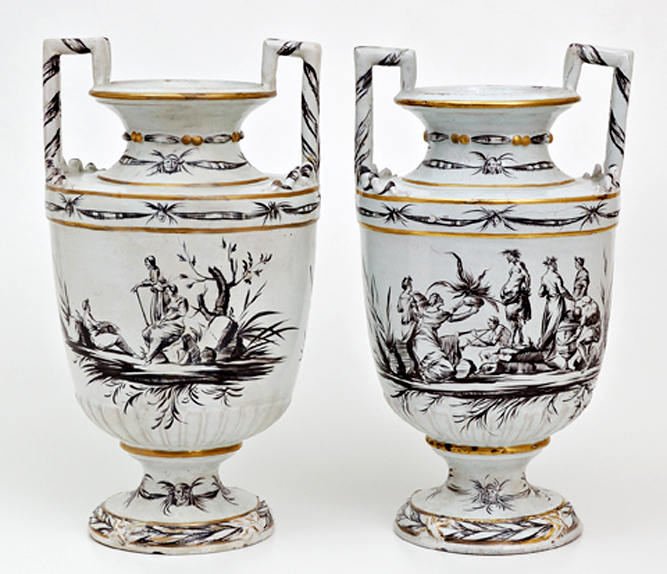 Coppia di Vasi a decorati con soggetto mitologico. Filippo Comerio nella manifattura Ferniani. Faenza 1777-1781.